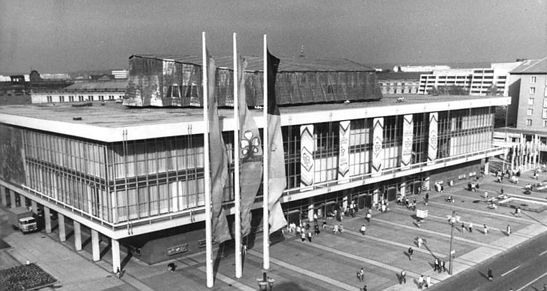 Dresden, Kulturpalast ADN-ZB Häßler 18.9.85 Dresden: Schlagerfestival. Das 14. Internationale Schlagerfestival wurde am 17.9.85 im Dresdener Kulturpalast eröffnet. 25 Solisten und Gruppen aus 18 Ländern sind an dem Wettbewerb um den Grand Prix beteiligt. Blick auf den geschmückten Kulturpalast. - siehe auch Motiv 1985-0918-27n